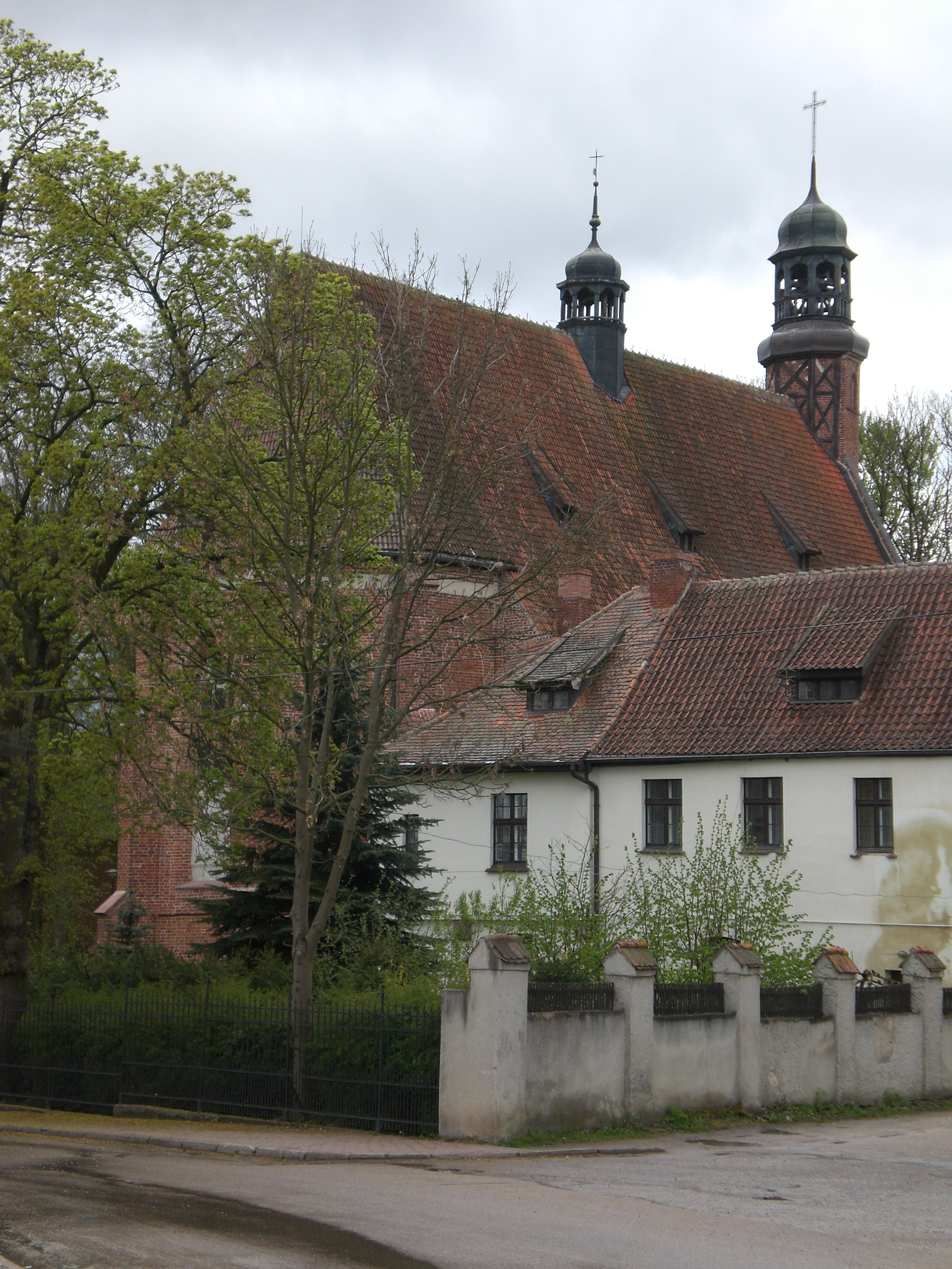 Żukowo - zespół klasztorny norbertanek, XIII, XVIII